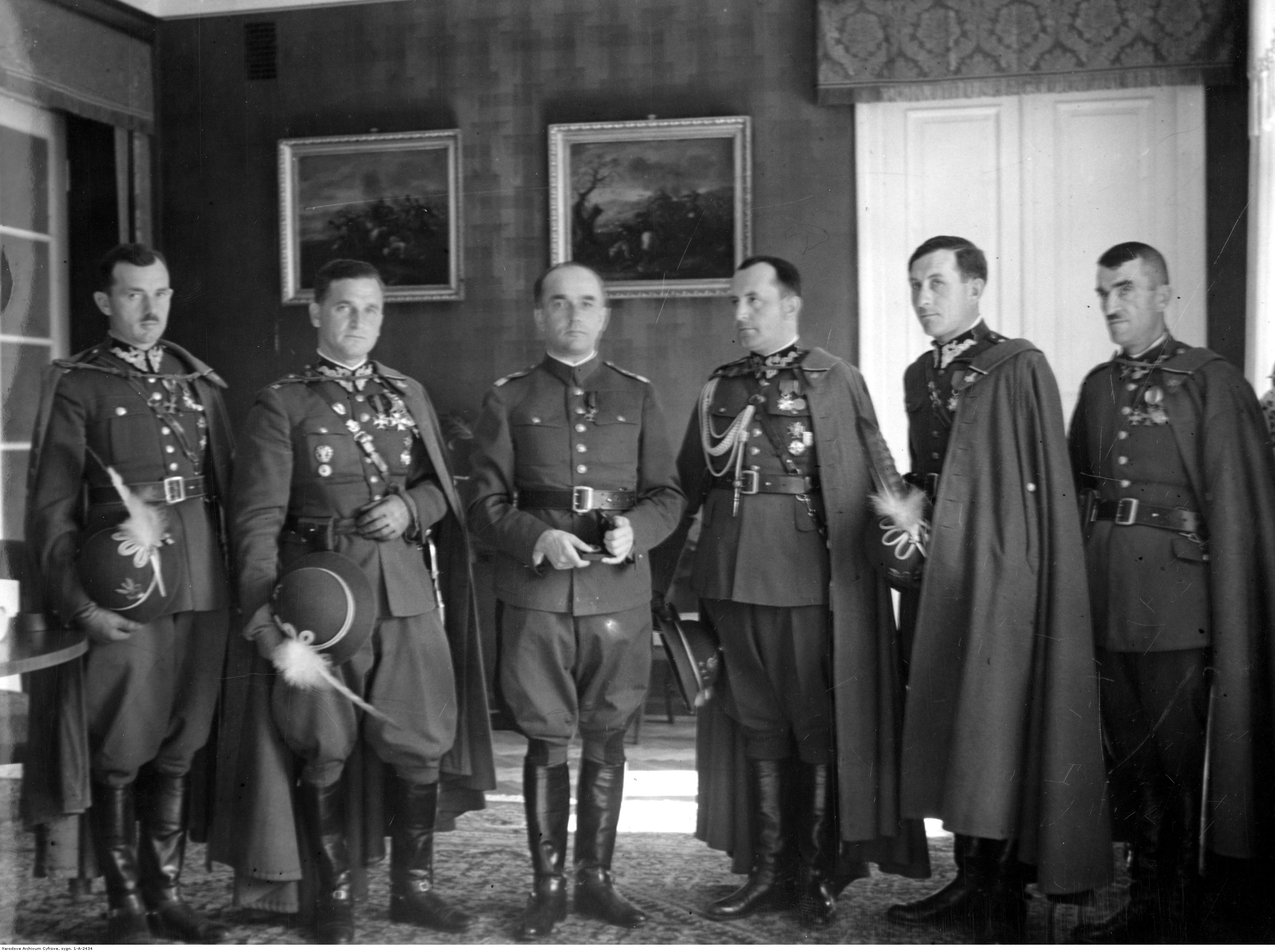 Wręczenie ministrowi spraw wojskowych generałowi Tadeuszowi Kasprzyckiemu (trzeci z lewej) odznaki pułkowej przez delegację 1 Pułku Strzelców Podhalańskich. Koncern Ilustrowany Kurier Codzienny - Archiwum Ilustracji. Sygnatura: 1-A-2434